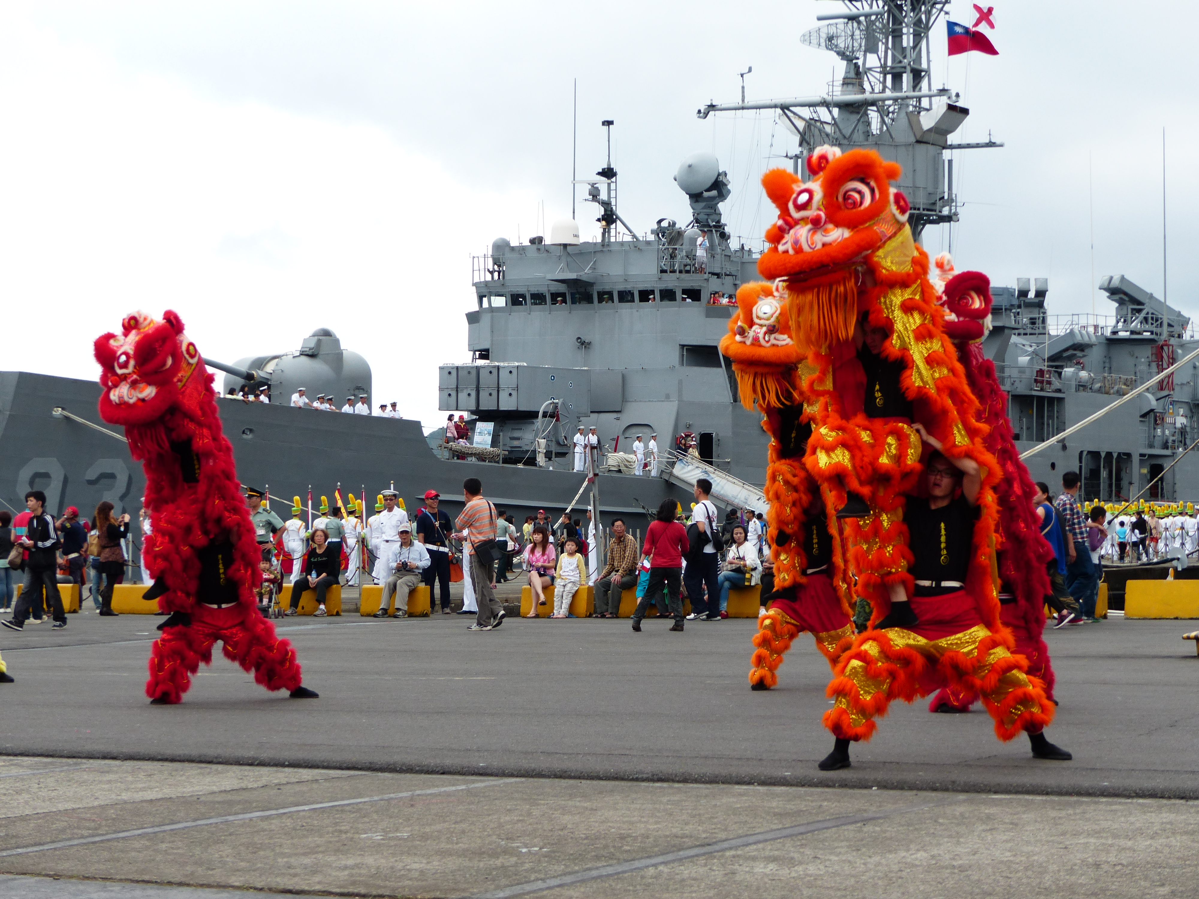 中文（台灣）: 2013年中正軍港營區開放活動下午表演，陸專龍獅社祥獅仰身。